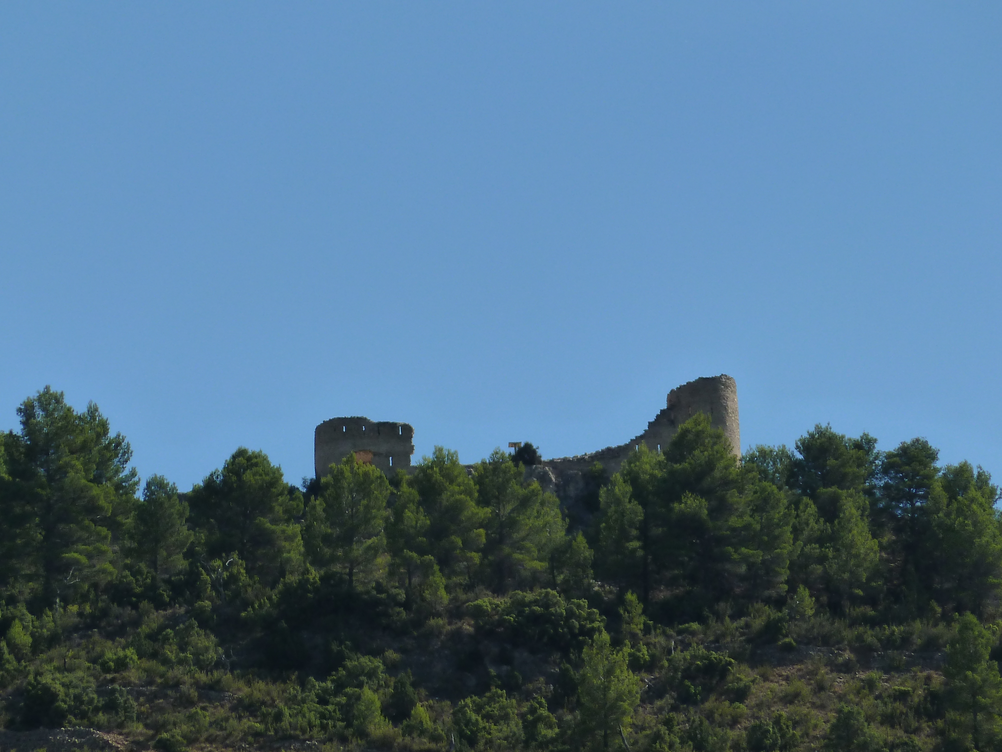 Fort de Cabrera